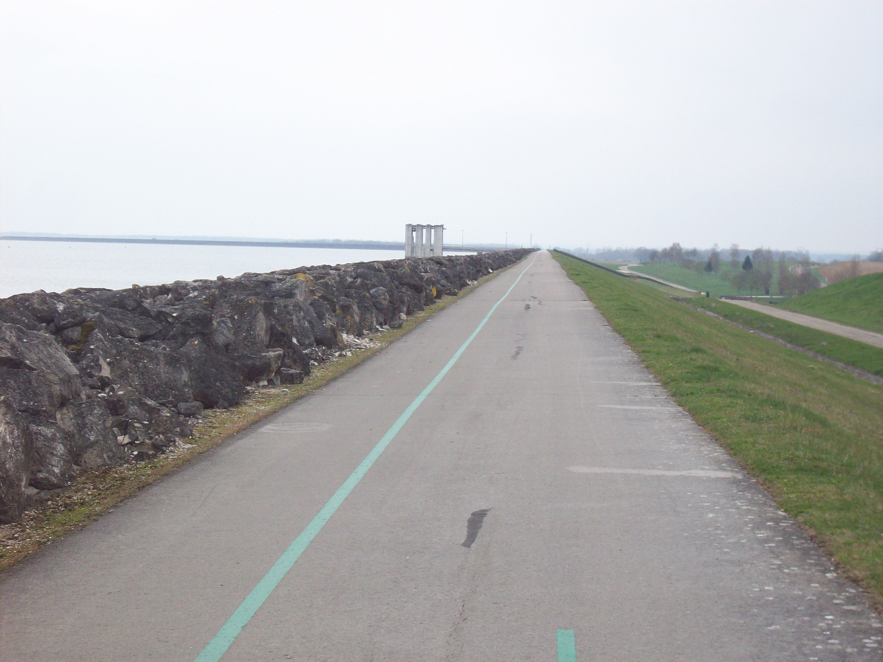 La vélovoie des lacs au lac du Temple.